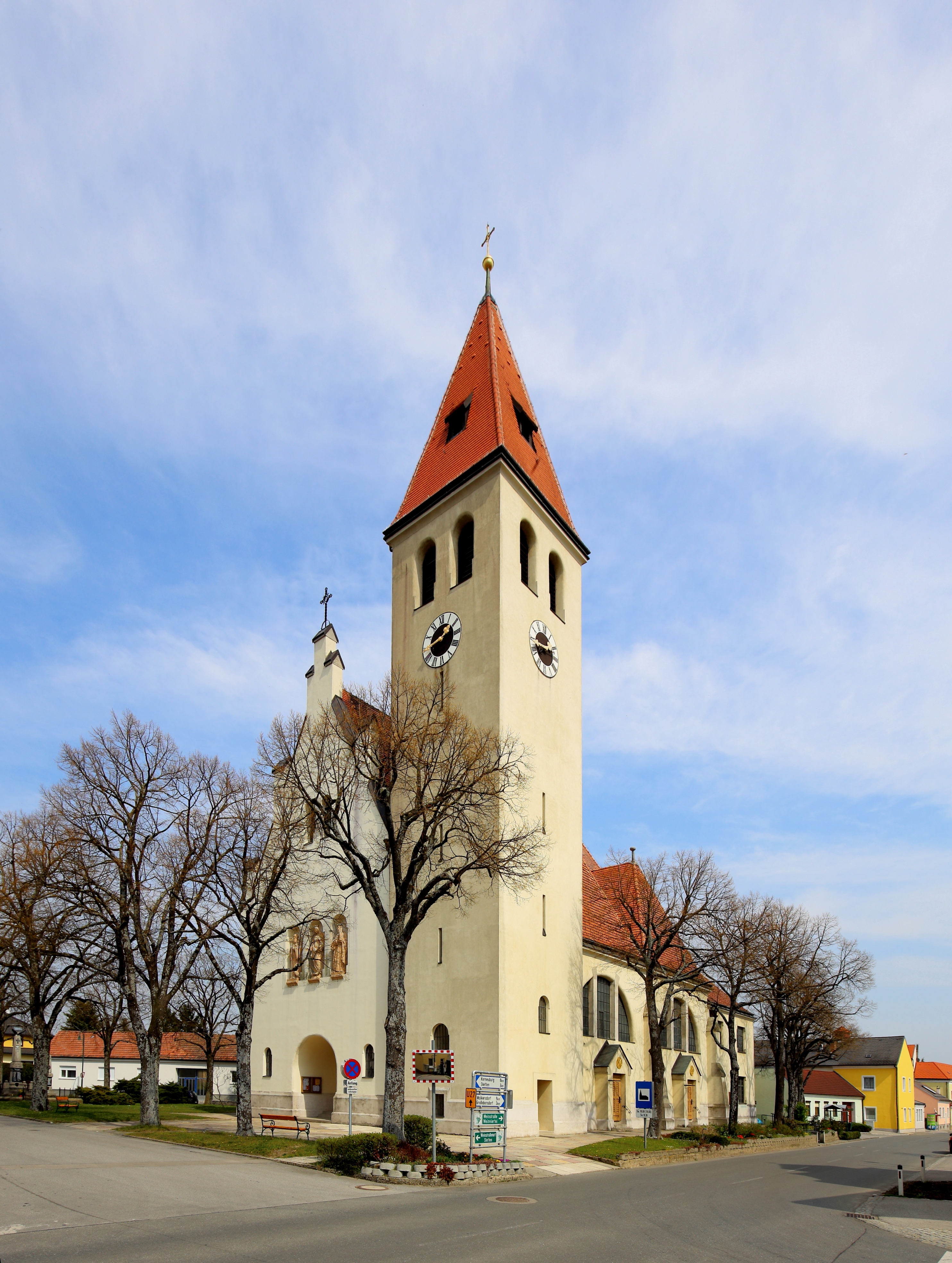 Südwestansicht der katholischen Pfarrkirche Maria Geburt in der niederösterreichischen Marktgemeinde Enzersfeld im Weinviertel. Die Kirche wurde von 1908 bis 1909 im sezessionistischen, romantisierenden Stil errichtet.